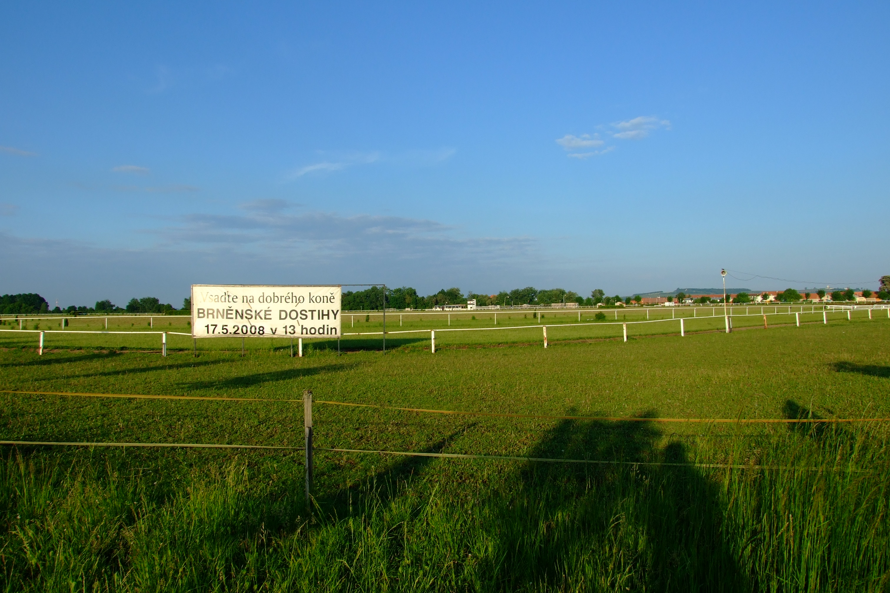 Brno-Dvorska - dostihové závodiště